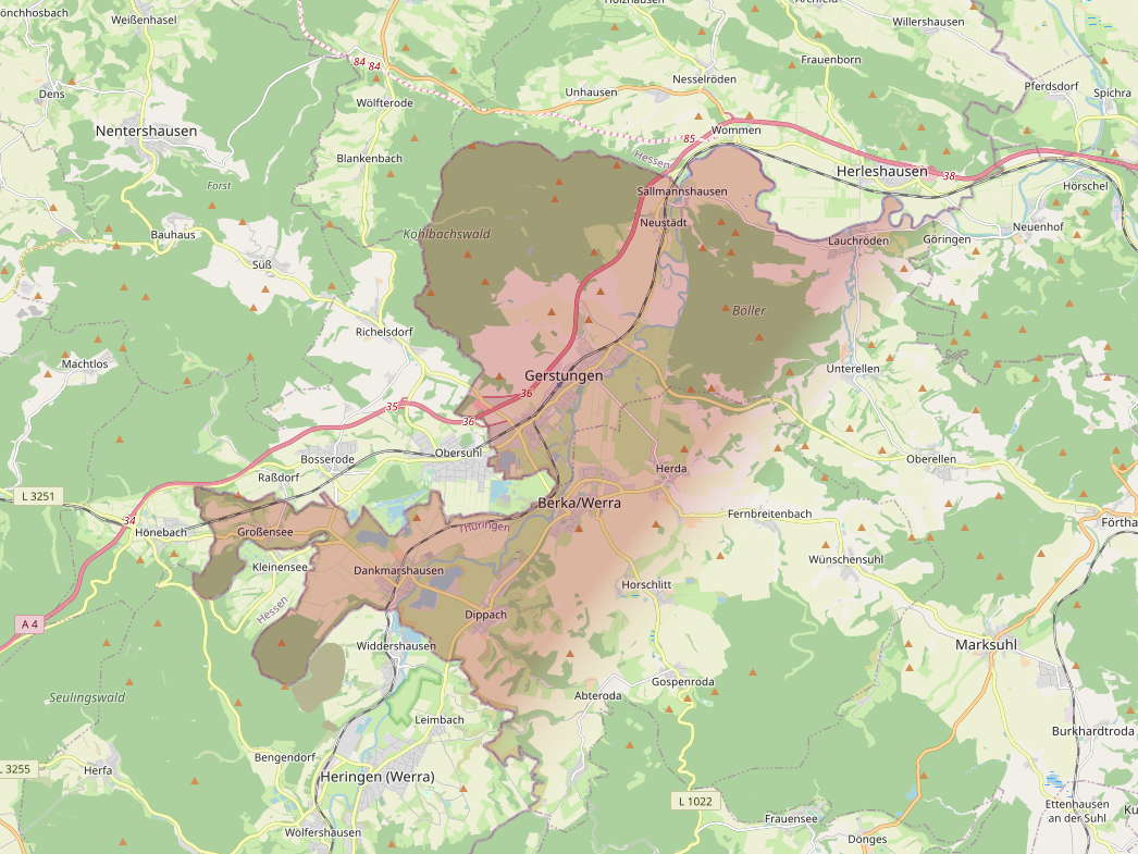 Übersichtskarte Thüringer Zipfel This map may be incomplete, and may contain errors. Don't rely solely on it for navigation.